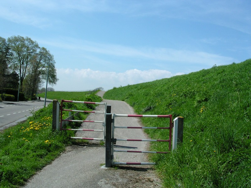 Dijkopgang van een dijk, in dit geval die van de Westfriese Omringdijk. Path to the top of dyke, in this case the Westfriese Omringdijk by Andijk.